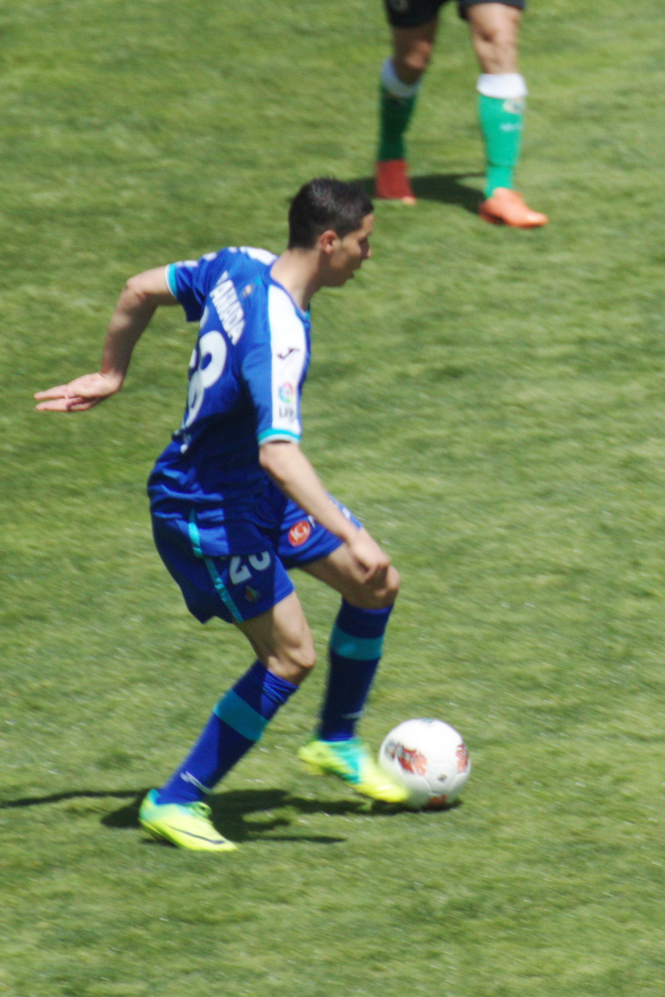 Abdelaziz Barrada (Provins, Francia, 19 de junio de 1989), futbolista nacido en Francia, de origen marroquí. Juega de centrocampista ofensivo.Fotografiado como jugador del Getafe Club de Fútbol de la Primera división de España.